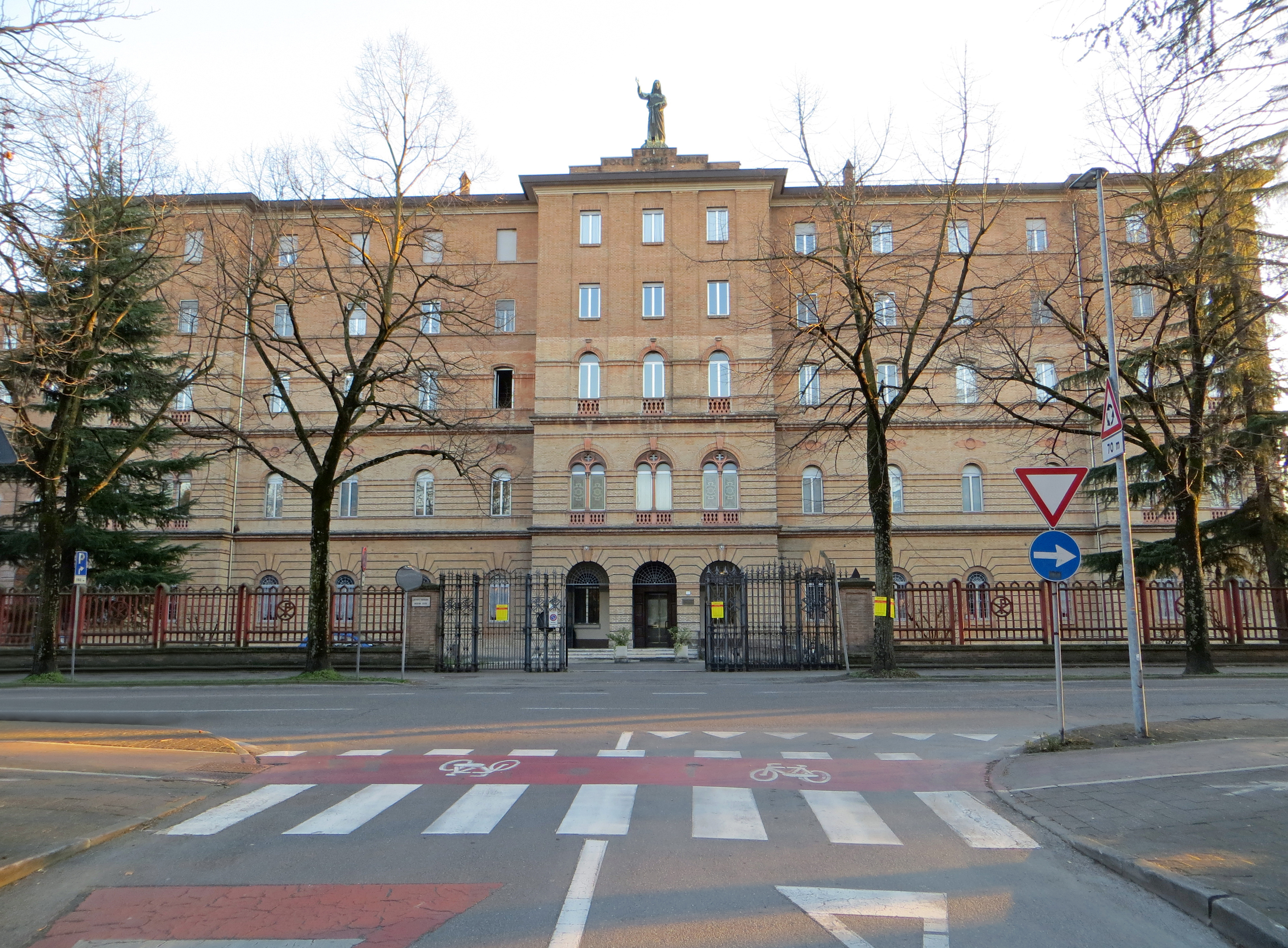 Casa madre dei Missionari Saveriani (Parma) - facciata